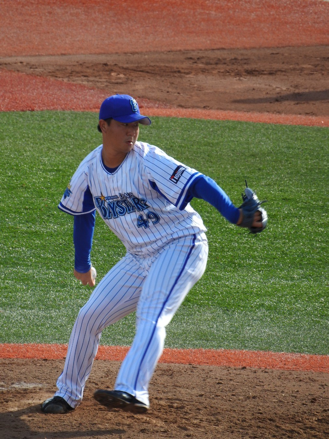 2019年9月29横須賀スタジアムにて